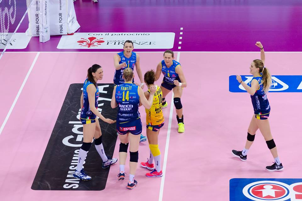 Vedi titolo